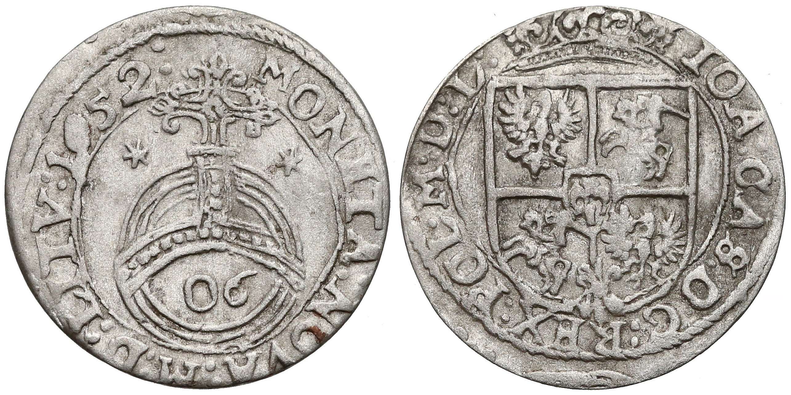 Półtorak koronny 1652 Wilno